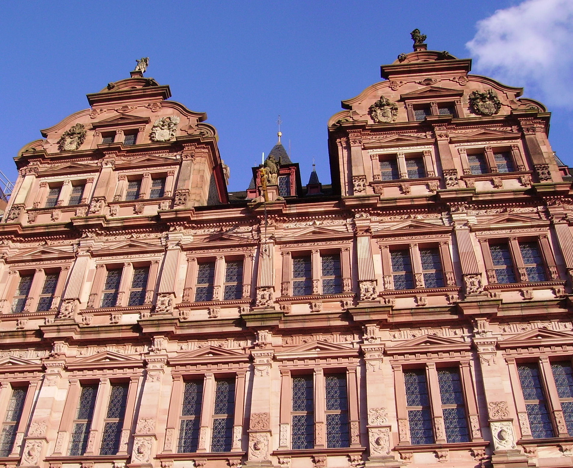 Heidelberger Schloss